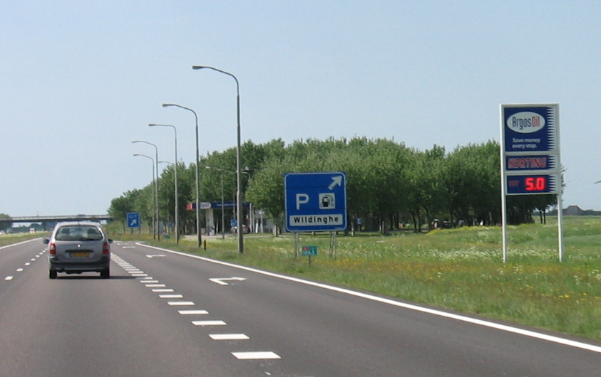 Verzorgingsplaats Wildinghe